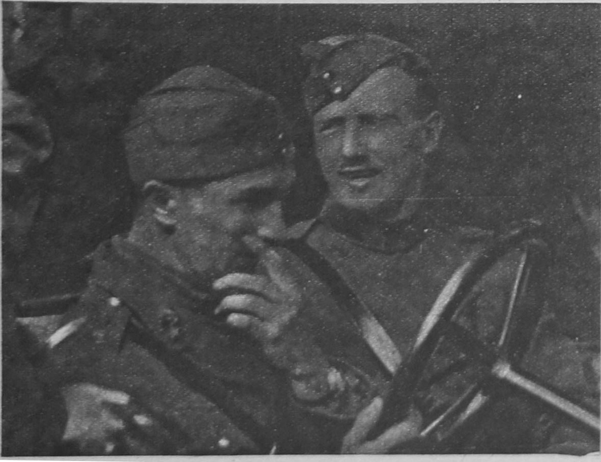 publié dans "le mioir".